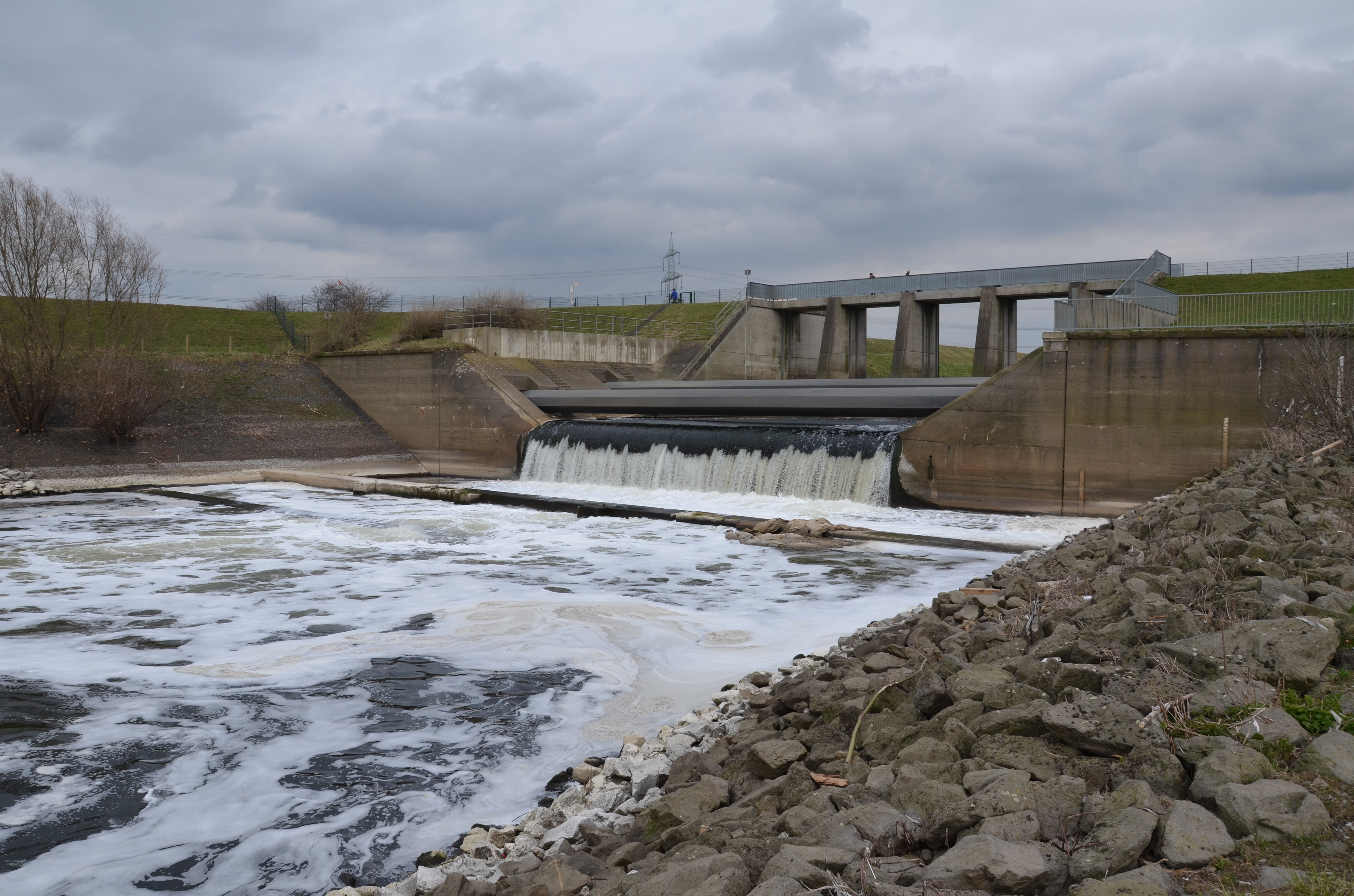 Emschermündung In den Rhein bei Dinslaken-Eppinghoven